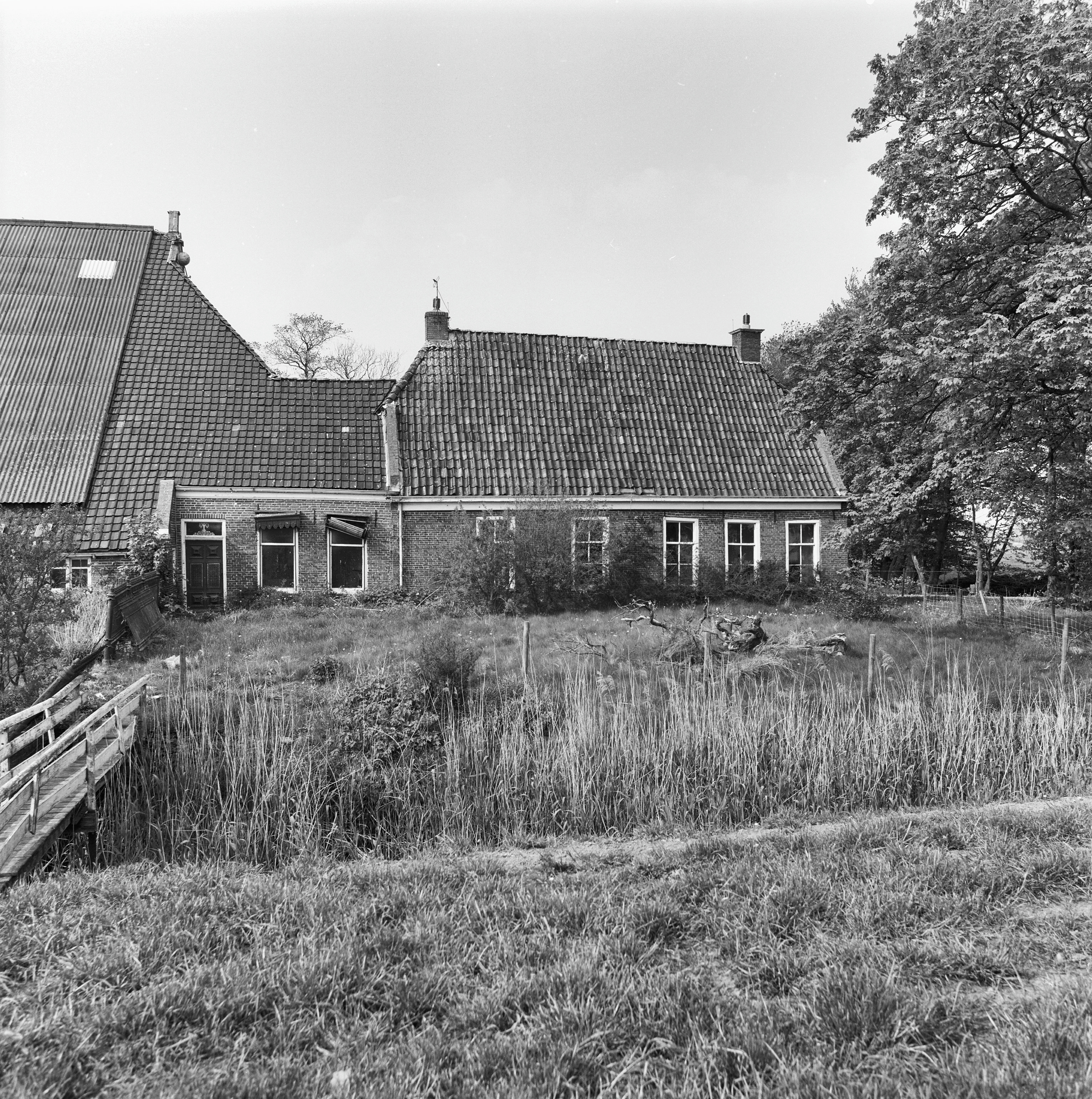 Castor: kop hals zuidzijde